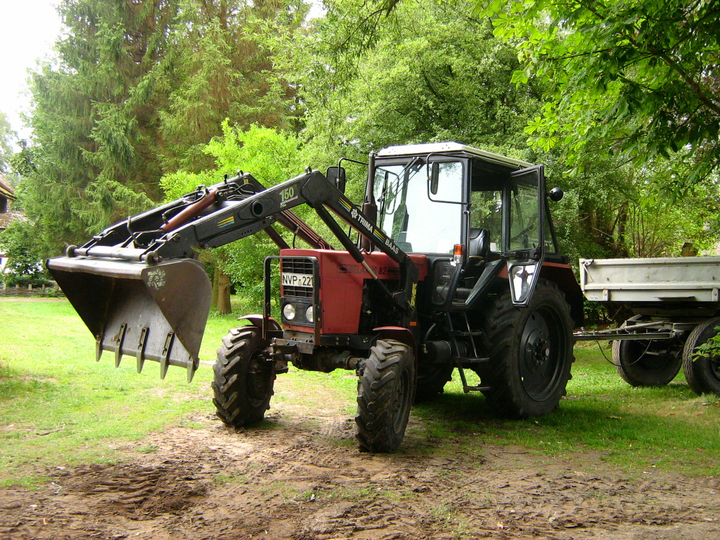 Ein Traktor MTS 82 „Belarus“ mit Trima-Frontlader bei der Arbeit im Freilichtmuseum Klockenhagen, Ribnitz-Damgarten im Landkreis Nordvorpommern, Mecklenburg.